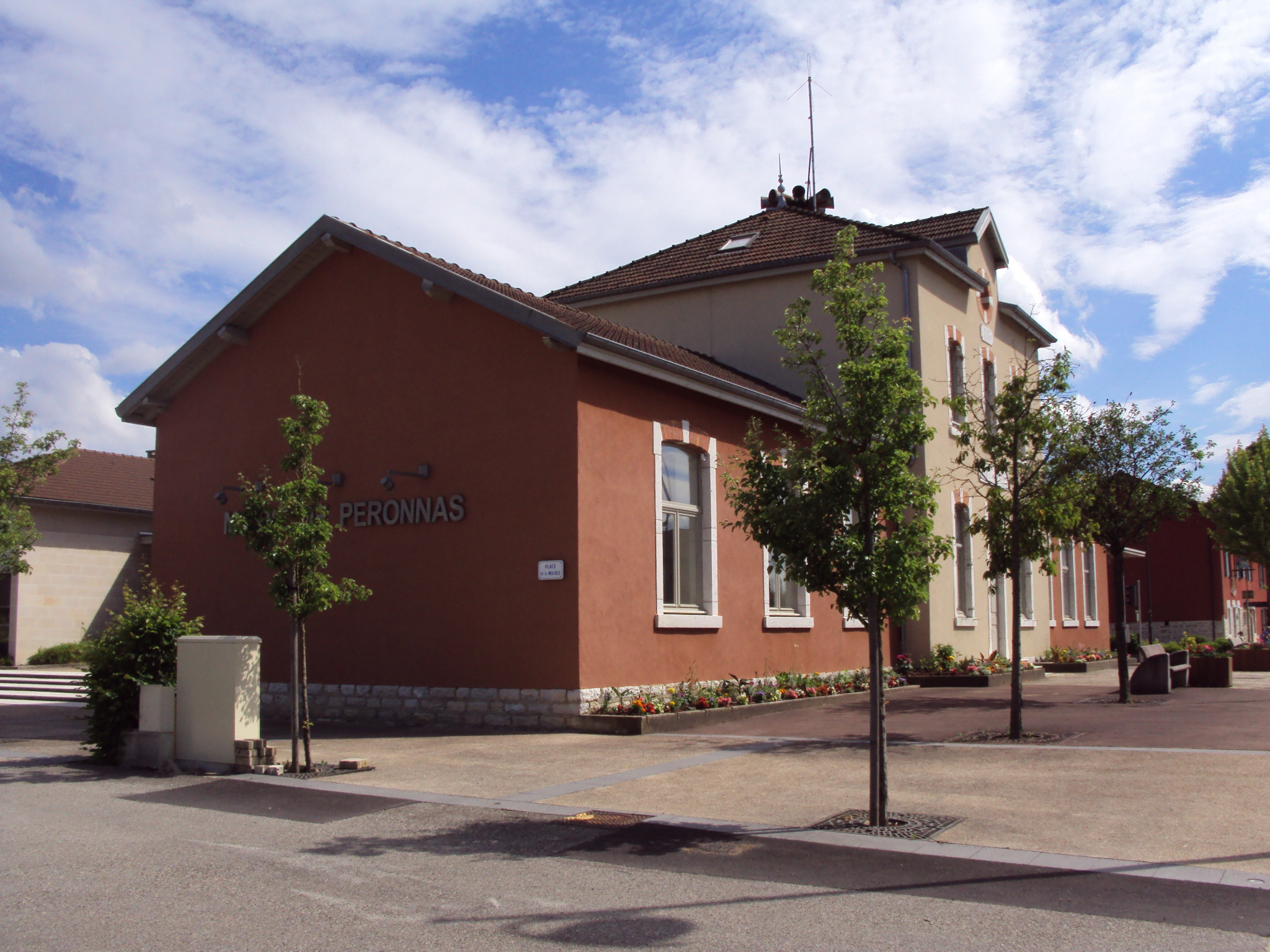 Mairie de Péronnas, Ain, France